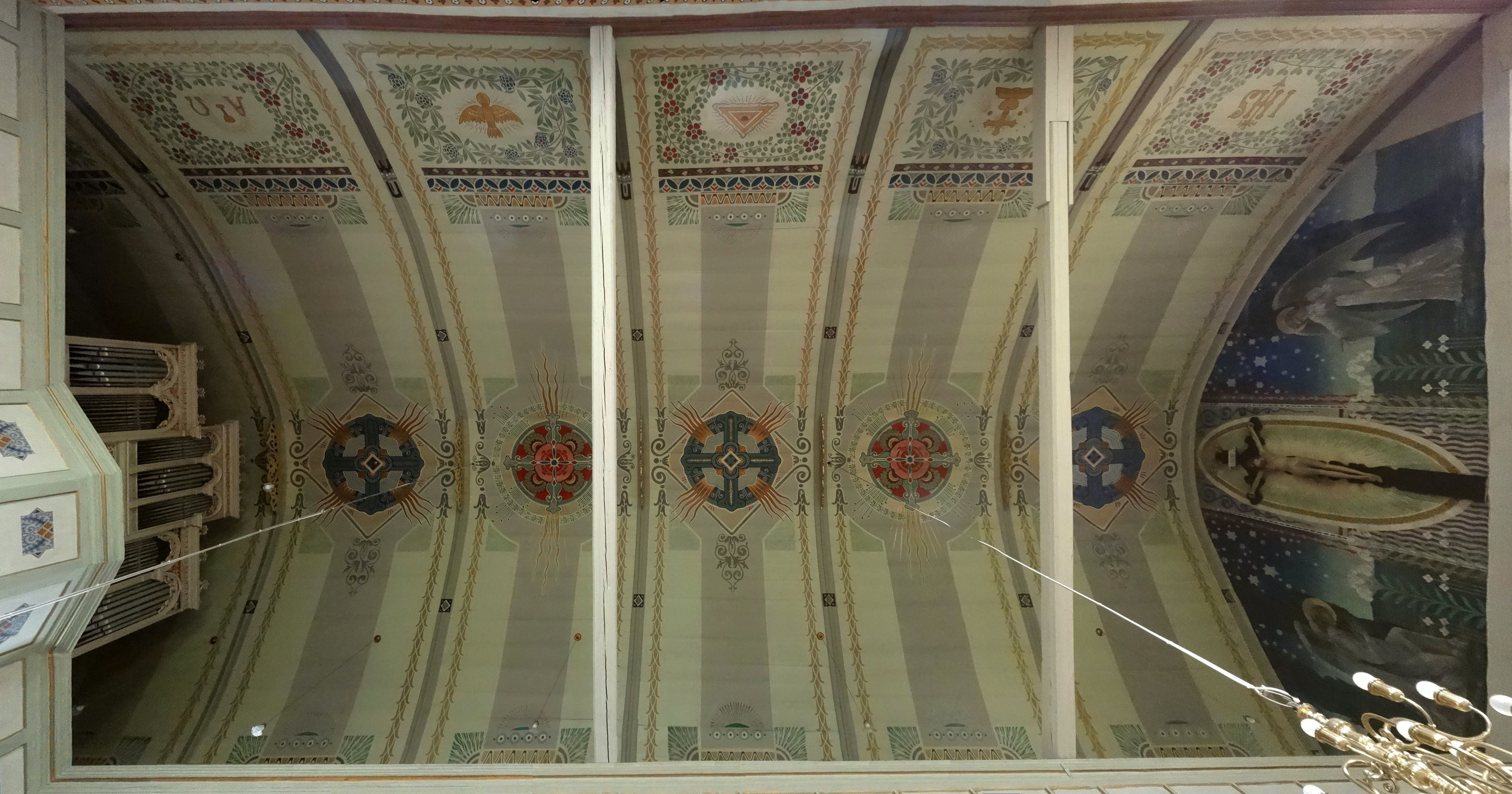 St. Johannes Uelleben, Deckenbemalung im Jugendstil um 1911.